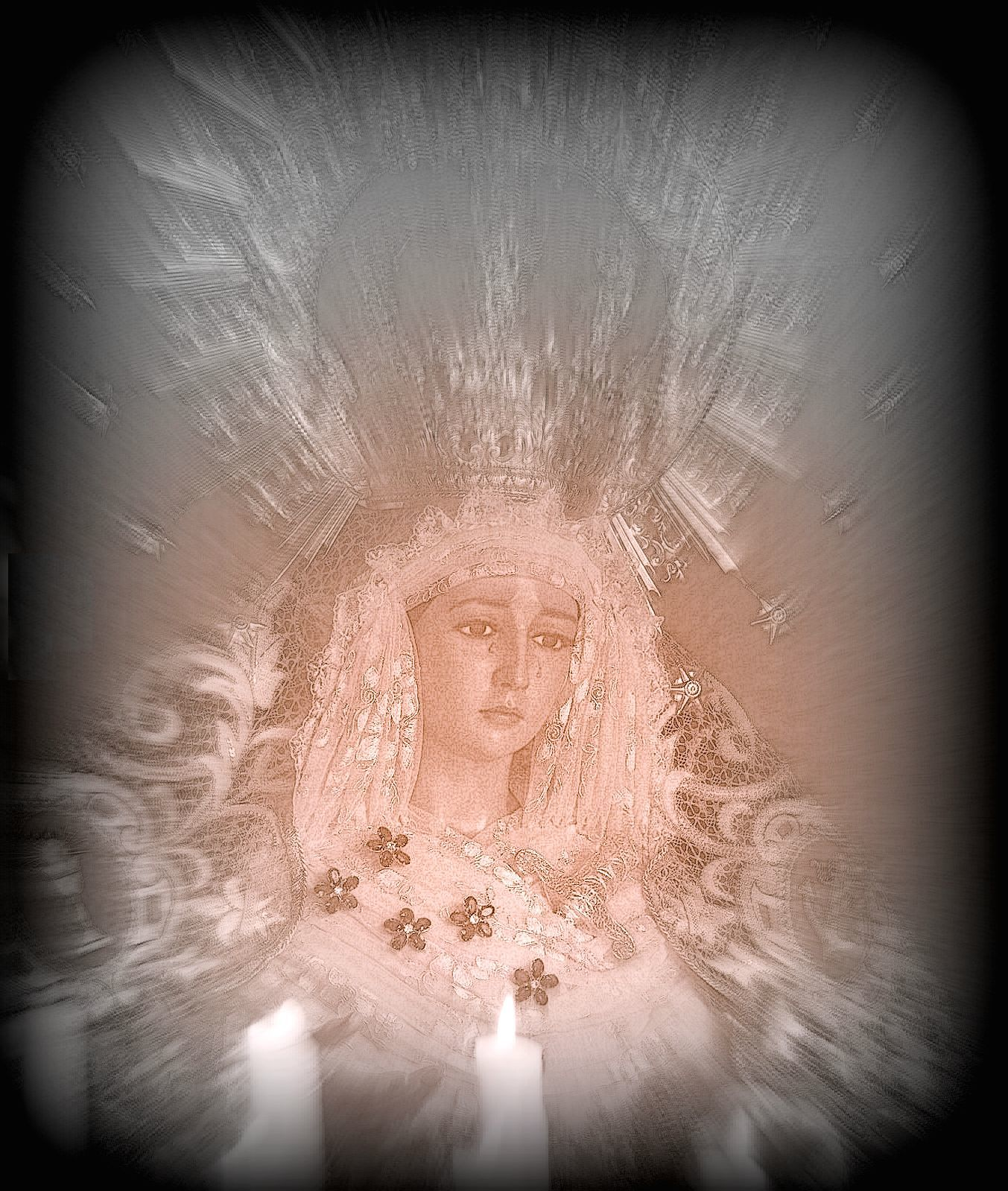 Esperanza rostro